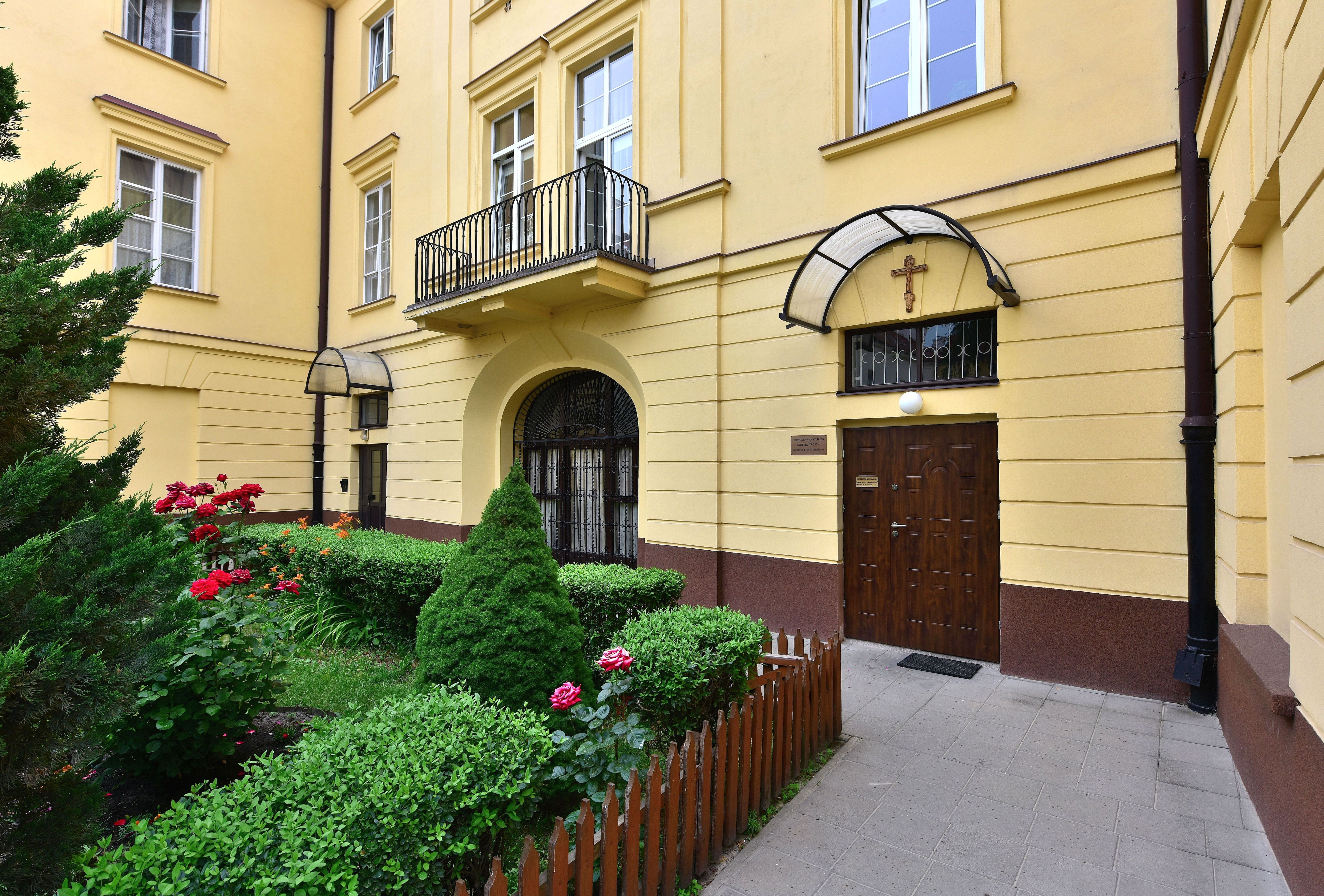 Prawosławna Kaplica Świętej Trójcy przy ul. Podwale 5 w Warszawie